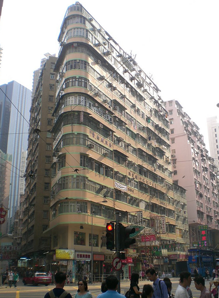 位於zh:莊士敦道與灣仔道交界, 一幢香港風格的洋樓, 在zh:大有大廈以南. Author= SHOLYWOD